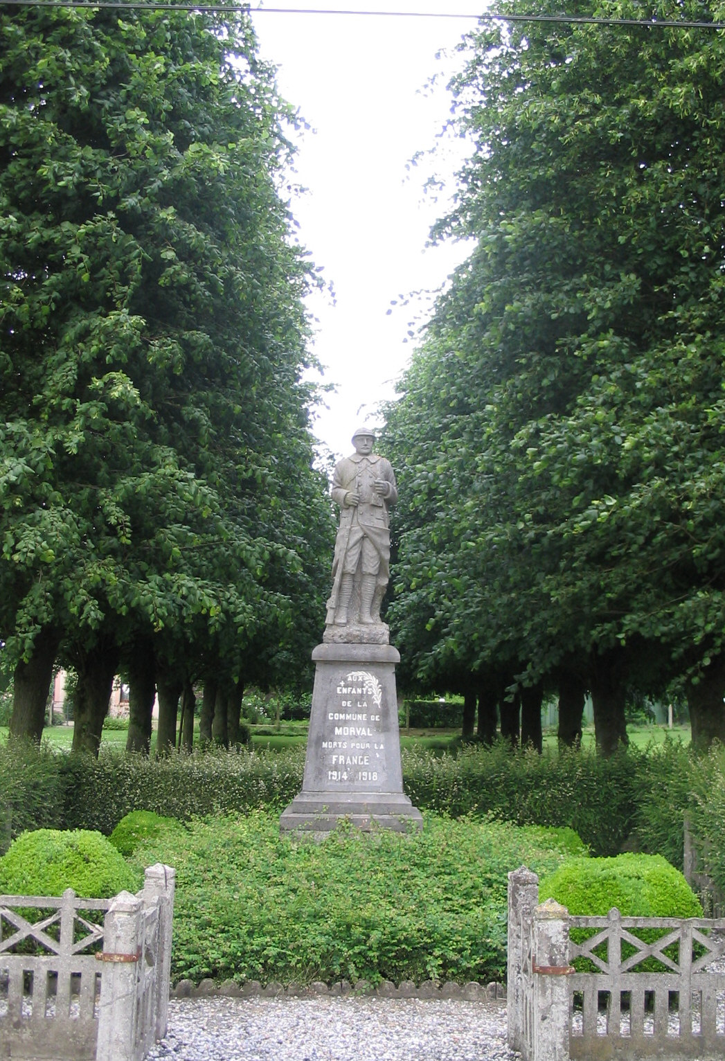 Monument aux morts de Morval